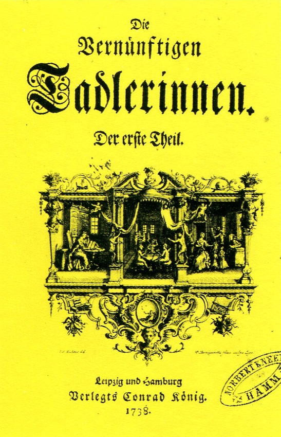 Titel von Die vernünftigen Tadlerinnen, der ersten deutschen Frauenzeitschrift, gegründet 1725